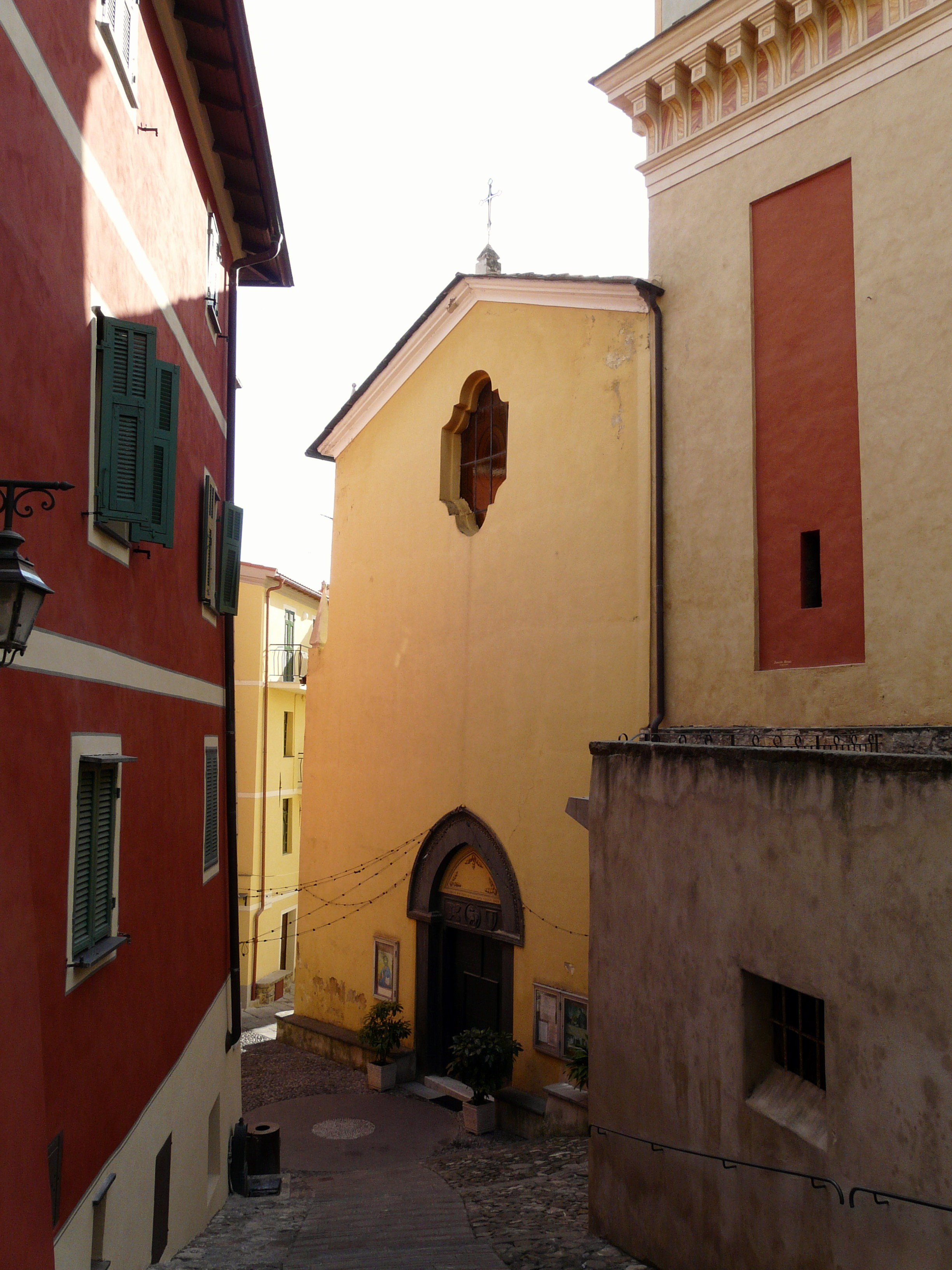 Chiesa di San Lorenzo, Vallebona, Liguria, Italia